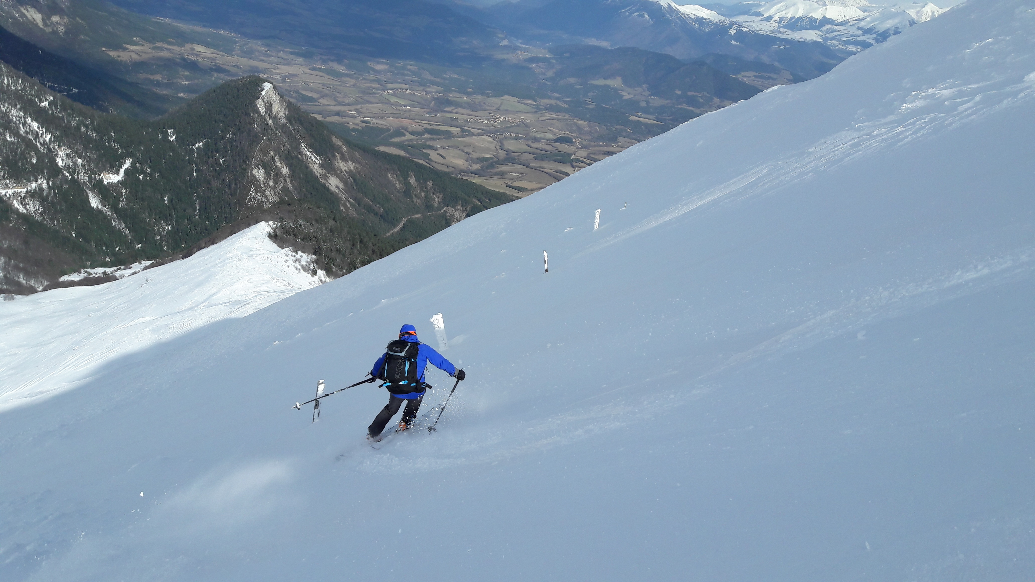 Skiing northen face of Jocou, from the Crête de Larchat to Vallon du ruisseau du Col de Seysse